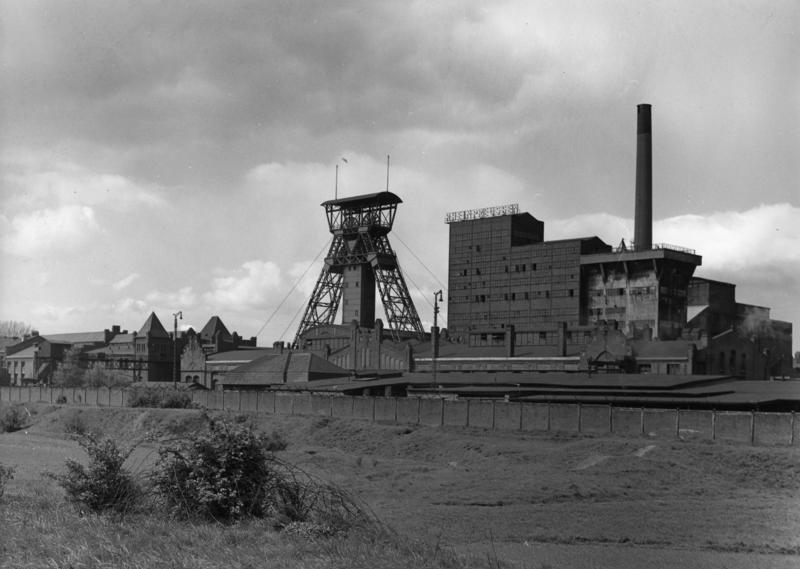 Zeche Rheinpreussen 4 Moers-Hochstrasse seit 1900, tägliche 3260to